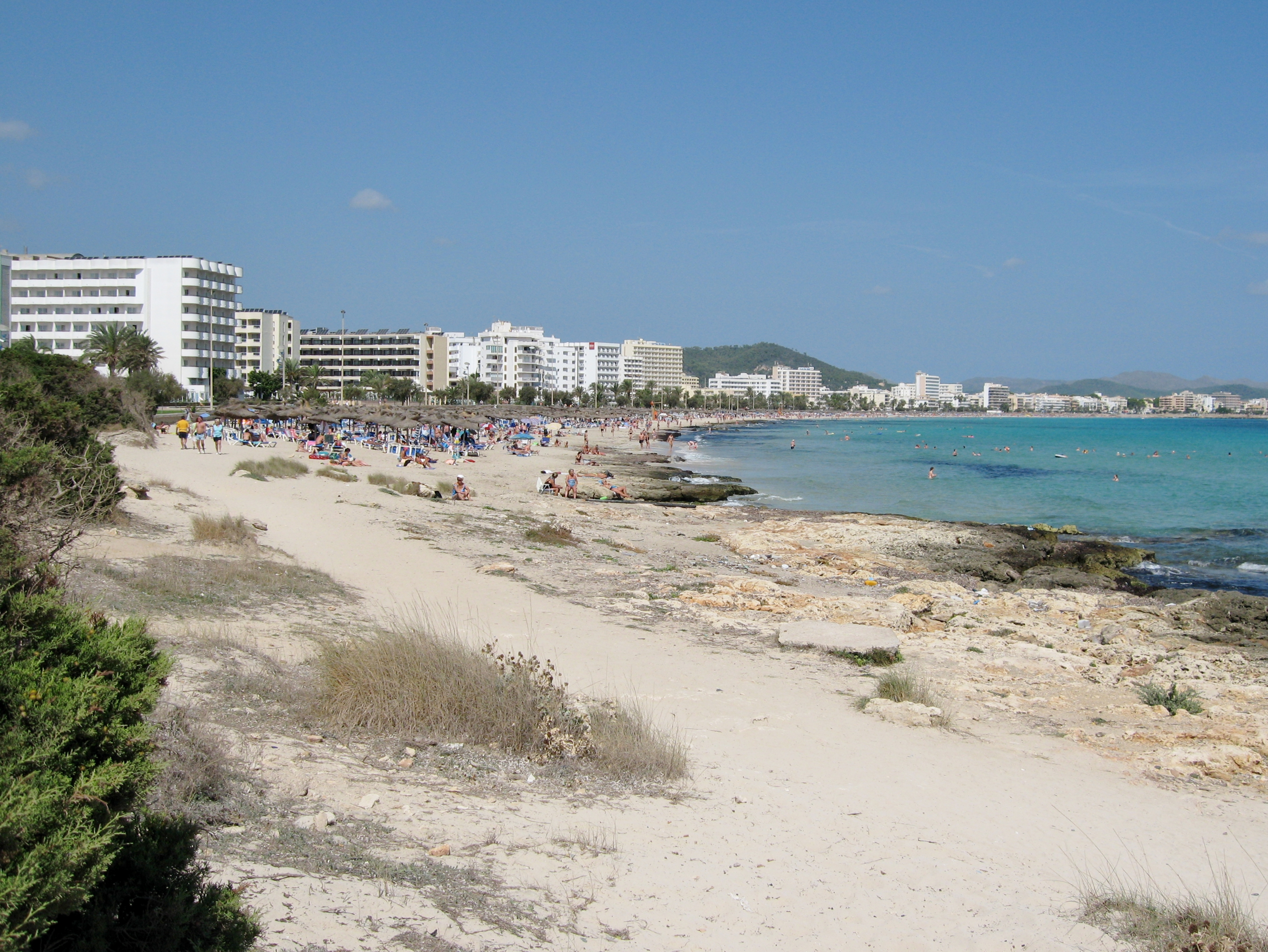 Cala Nau, Platja de Sant Llorenç, Sant Llorenç des Cardassar, Mallorca, Spain